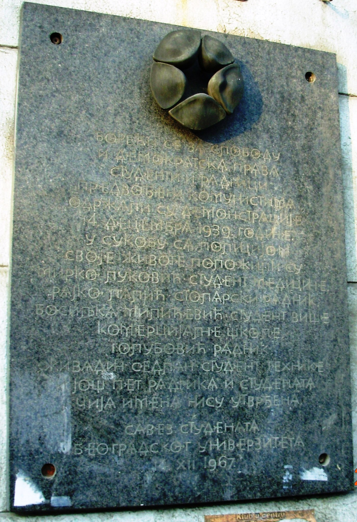 Табла у бившој улици 14. децембра. Сликао Голдфингер. Текст на табли, унет због слабе видљивости, гласи „Boreći se za slobodu i demokratska prava studenti i radnici, predvođeni Komunistima, održali su demonstracije 14. Decembra 1939. godine. U sukobu sa policijom, svoje živote položili su: Mirko Luković, student medicine, Bosiljka Milićević, student više komercijalne škole, Golubović radnik, Živadin Sedlan student tehnike, i još pet radnika i studenata čija imena nisu utvrđena. Savez studenata Beogradskog univerziteta 14. XII. 1967.“